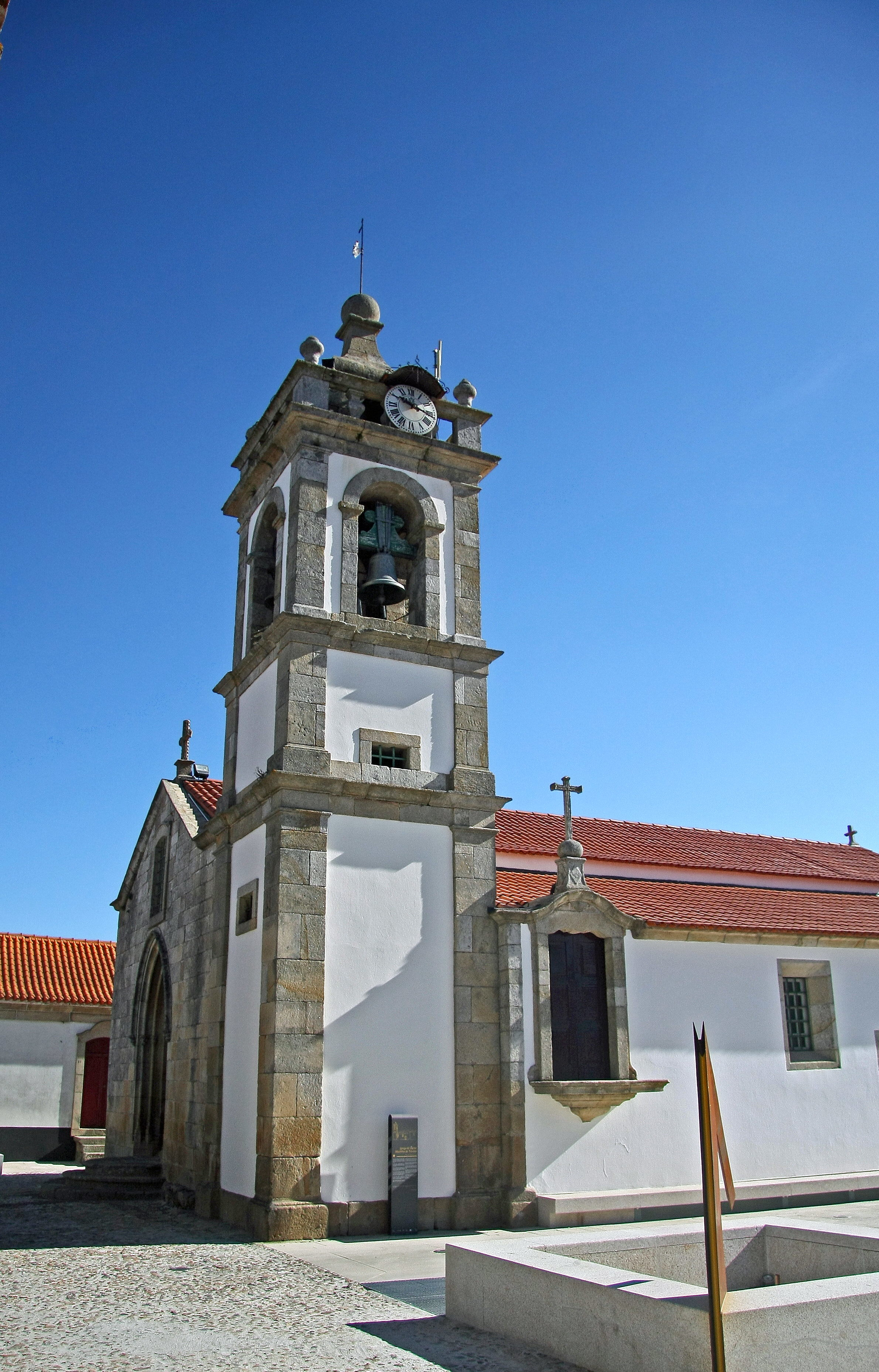 Na freguesia (e Vila) de Trevões, a Igreja Matriz de Sta. Marinha (monumento nacional). Elevada a paróquia no séc. XIII, possui marcas da sua antiguidade, especialmente devido às fortes paredes e às portas e janelas em arco partido. Presume-se que Nuno Caiado de Gamboa, ofereceu a esta igreja, no ano de 1600, os altares laterais, bem como a imagem de Nossa Sra. da Conceição em marfim, que é uma preciosa escultura, daí que só se exponha no templo nos dias de festa. Em 1755, a velha torre foi demolida, dando origem a uma outra. Durante este processo, encontraram-se antigas pedras lavradas com inscrições góticas.